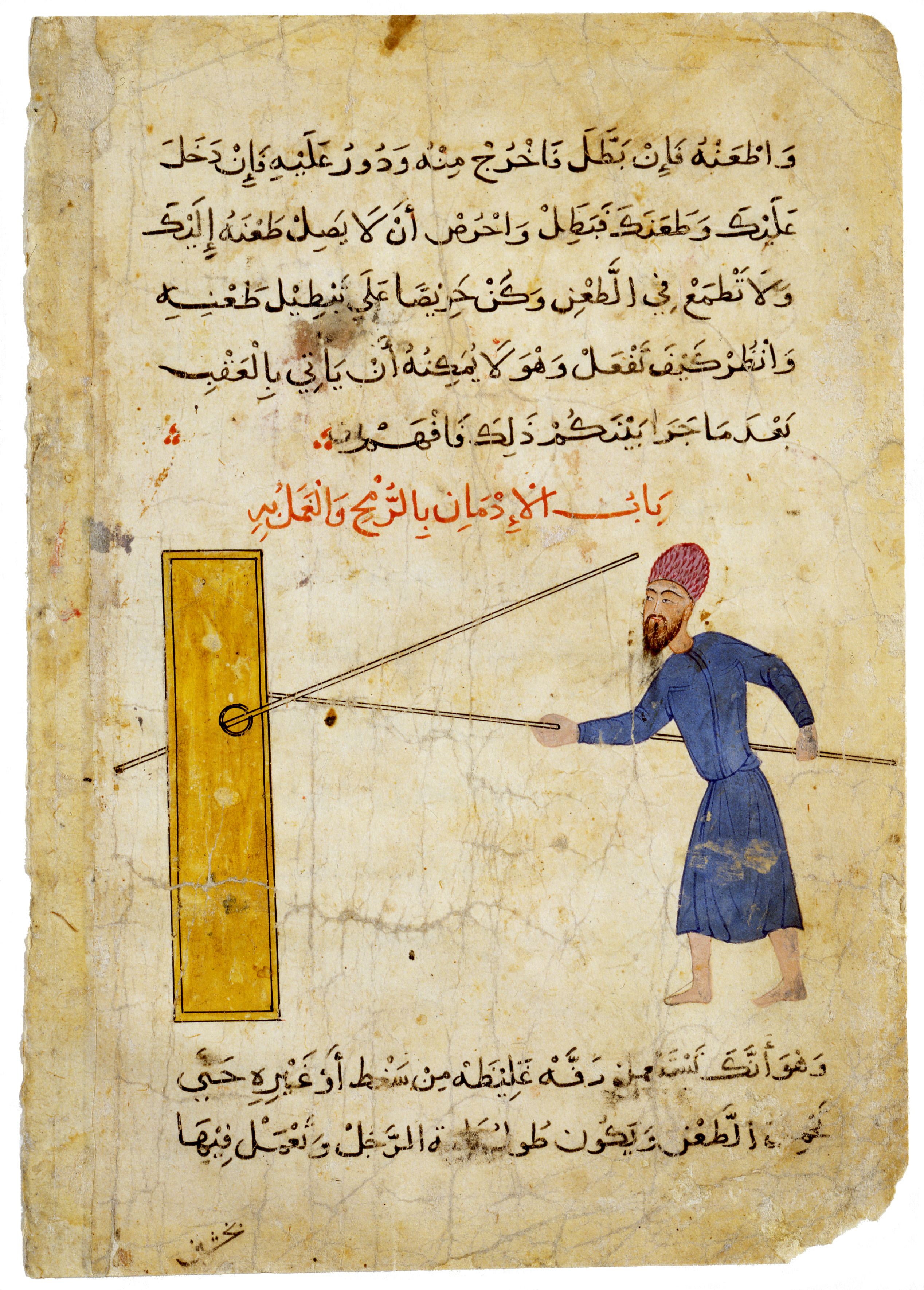 Miniature fra et Furusiyya-manuskript. ”Mamluk der øver med en lanse”, Egypten eller Syrien; ca. 1500, Bladet: 24 × 16,7 cm